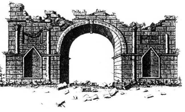 Arc de Volubilis en 1721, Henry BOYDE